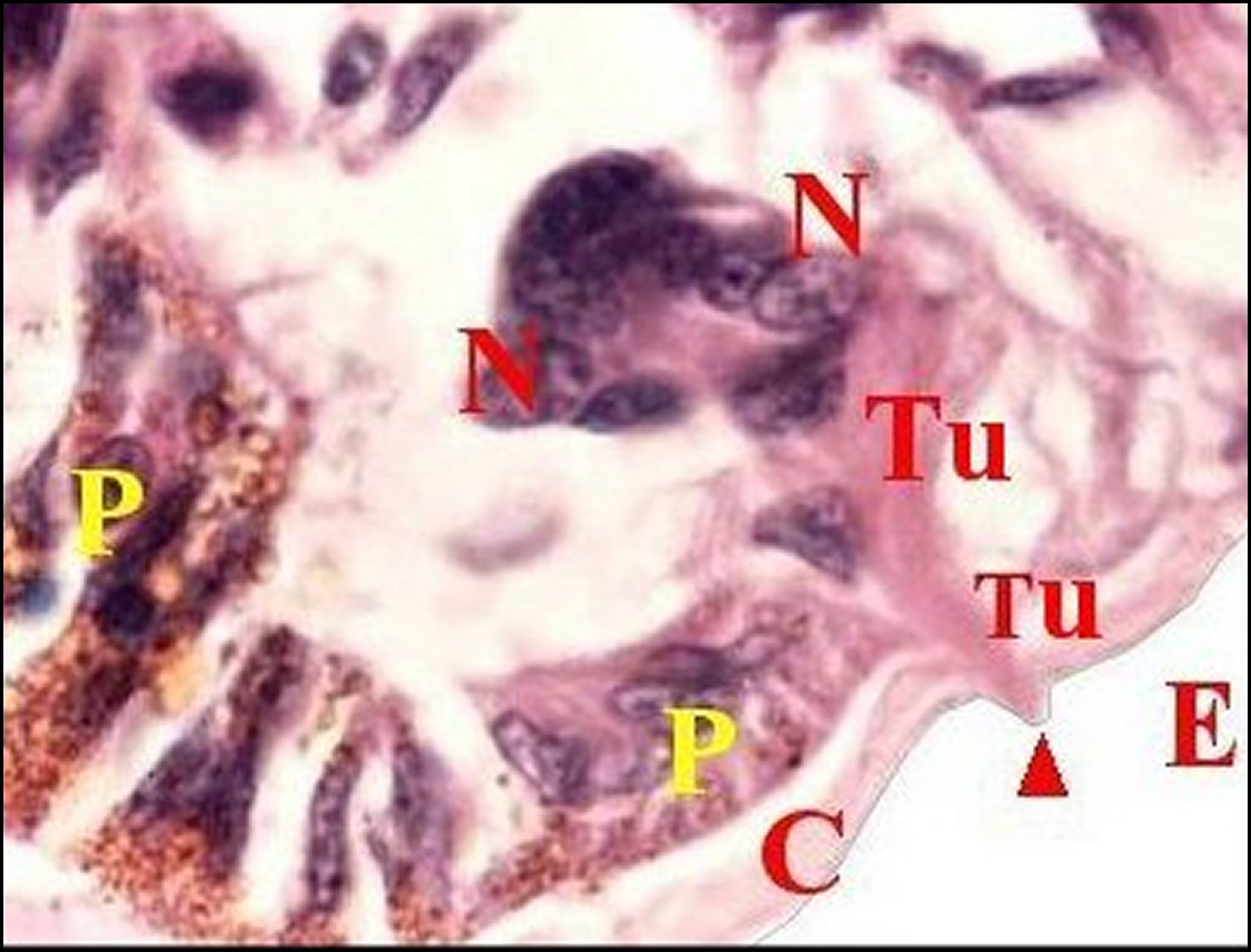 Organe gonoporal de Chiracanthium punctorium en coupe histologique